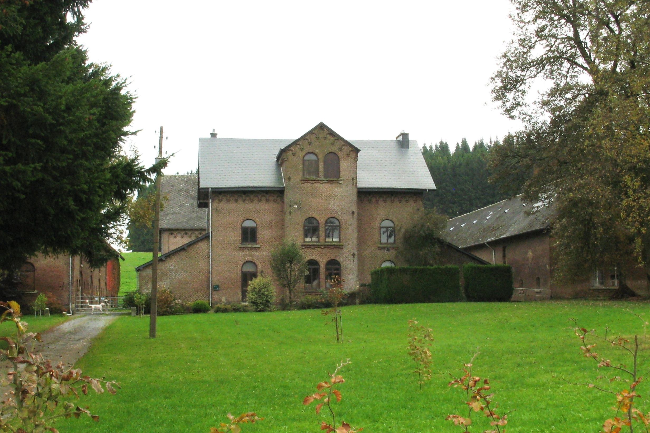 Ferme à Losange